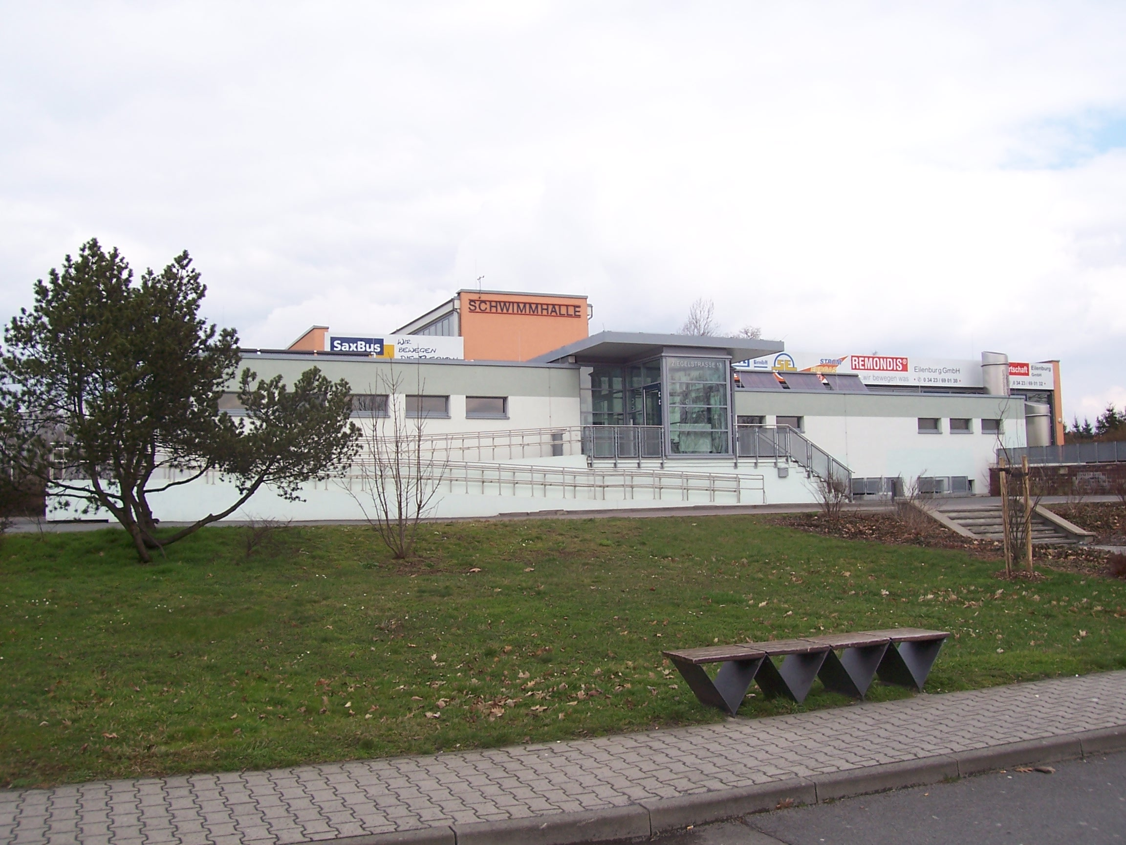 Schwimmhalle in Eilenburg, Stadtteil Ost (Ziegelstraße)